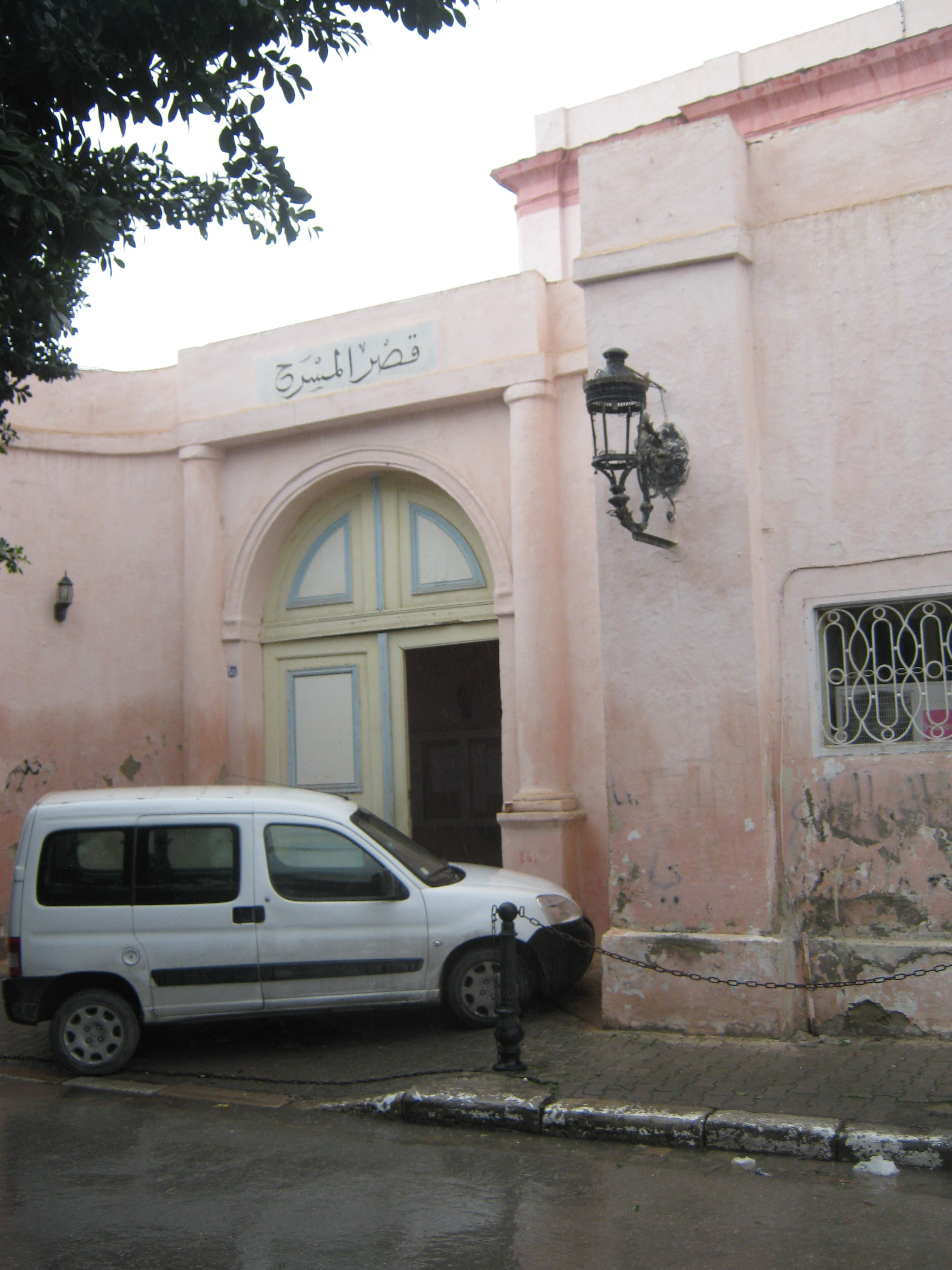 Porte cochère de l'ancien palais de Mustapha Khasnadar